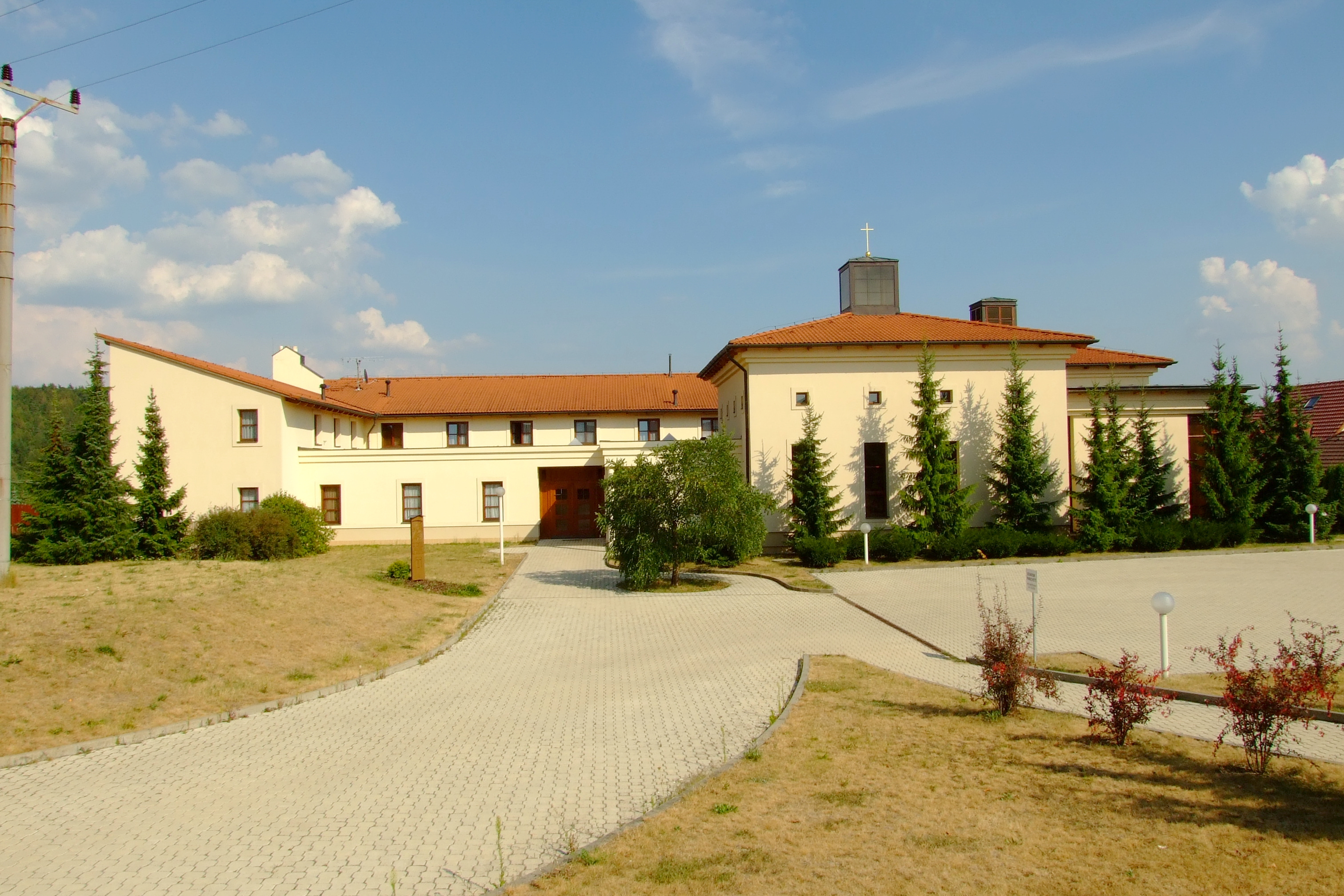 Brno-Soběšice - klášter sester klarisek